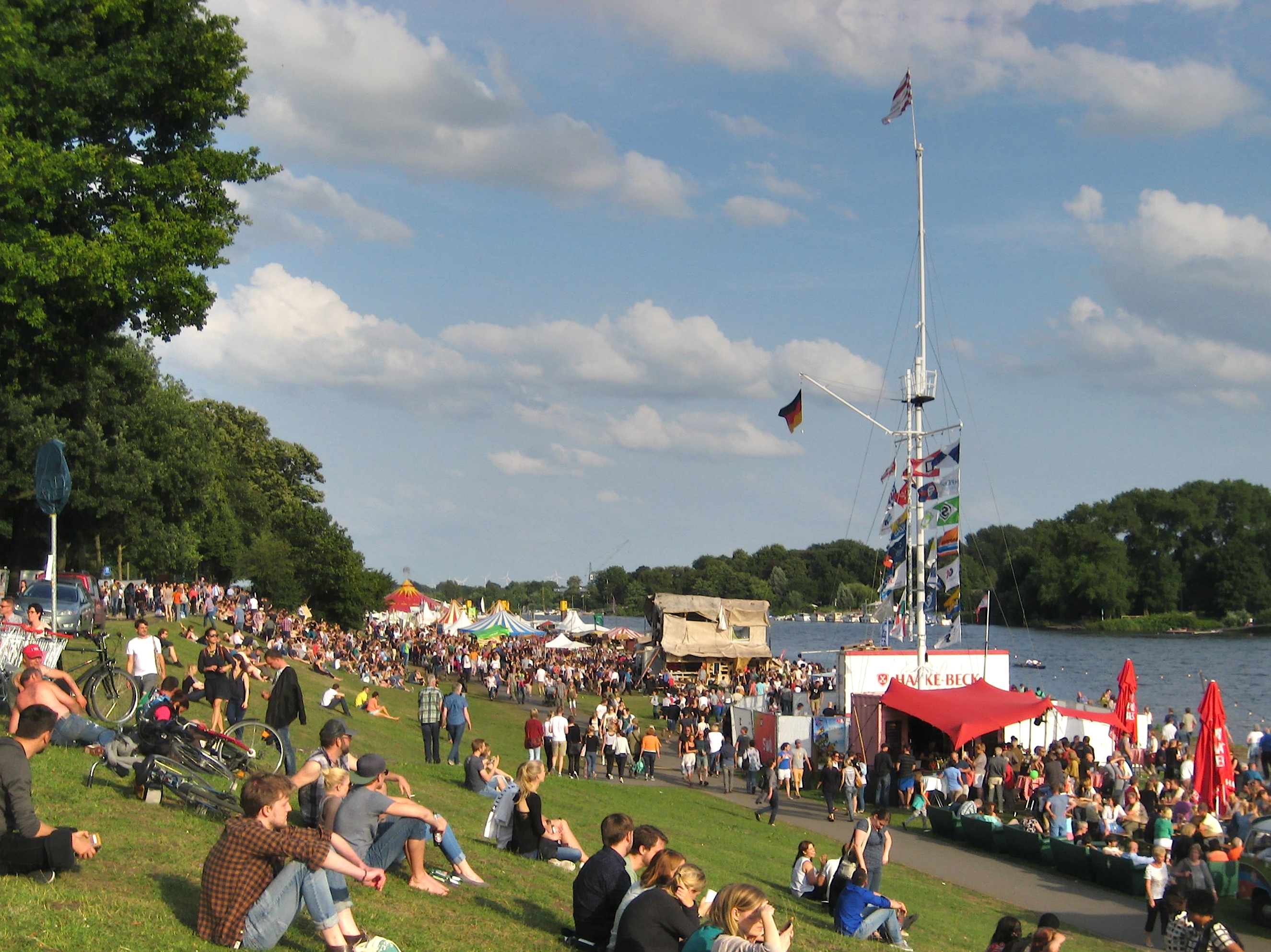 Beim Open-Air-Kulturfestival Breminale 2015 am Osterdeich in Bremen, Deutschland. Hier: Teil des Festivalgeländes, halbrechts der Flaggenmast Bremer Reedereien und Binnenschiffer nahe dem Altenwall, rechts und im Hintergrund die Weser und der Stadtwerder.